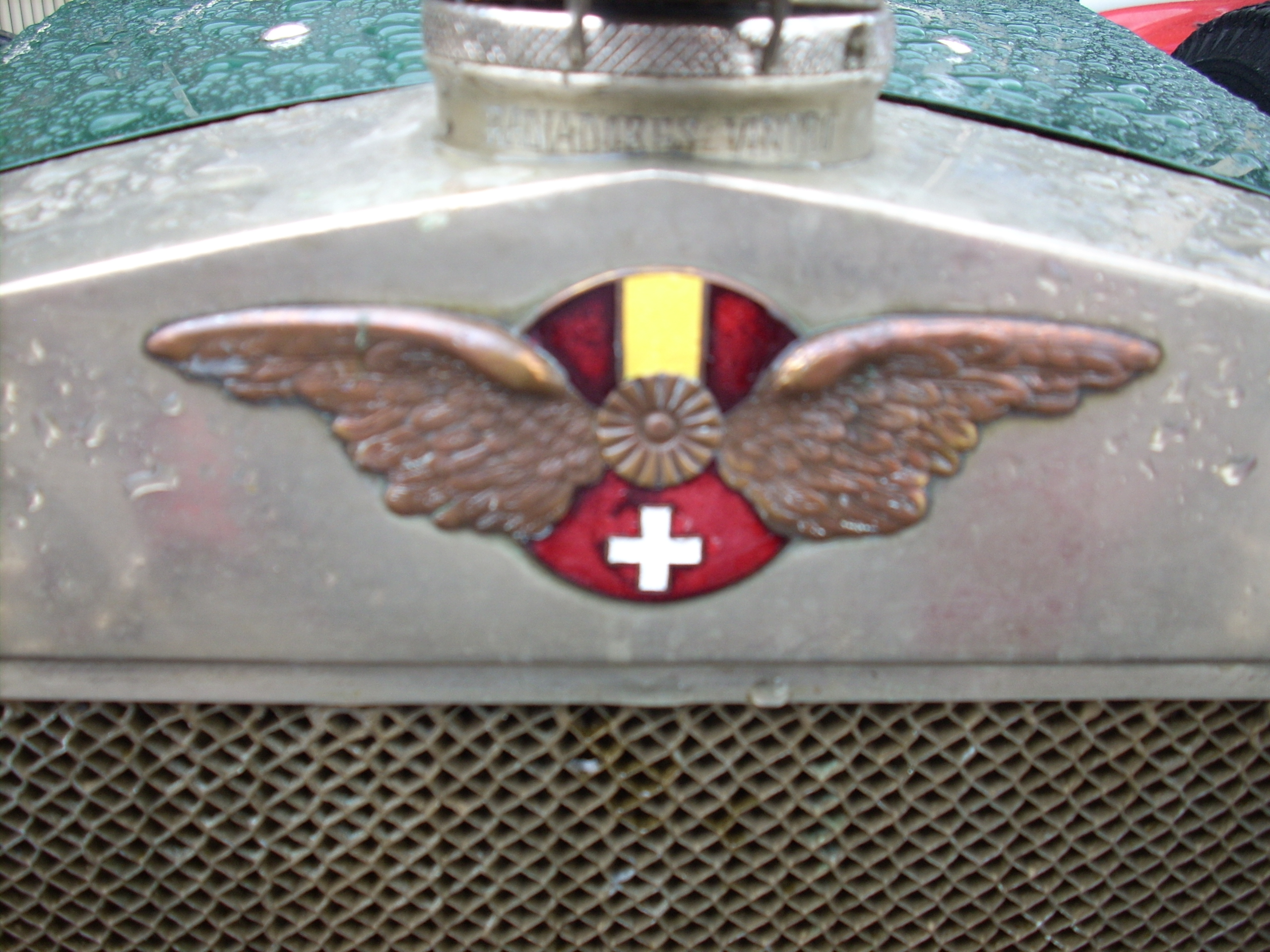 Emblema de la marca Hispano Suiza